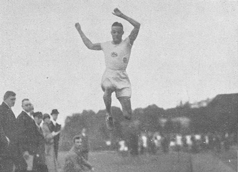 Erich Köchermann, Kampfspielsieger Köln 1926 im Weitsprung mit 7.275 m.